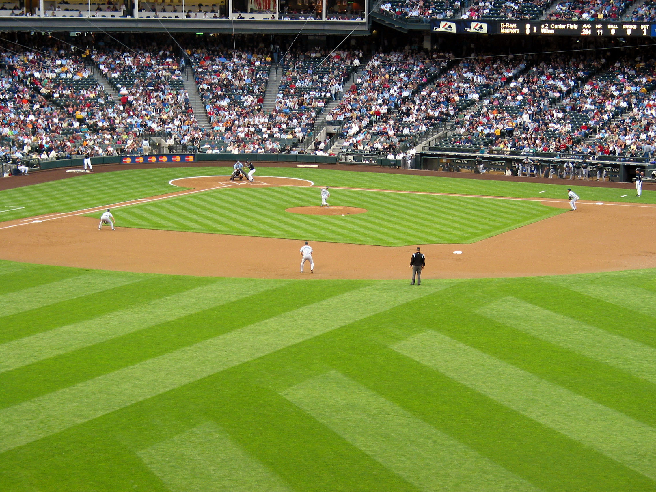 a baseball game